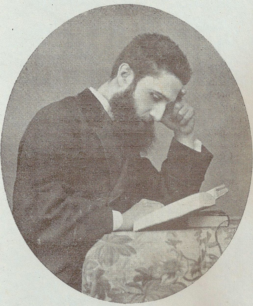 Fotografia de Josep Martí i Folguera 1897